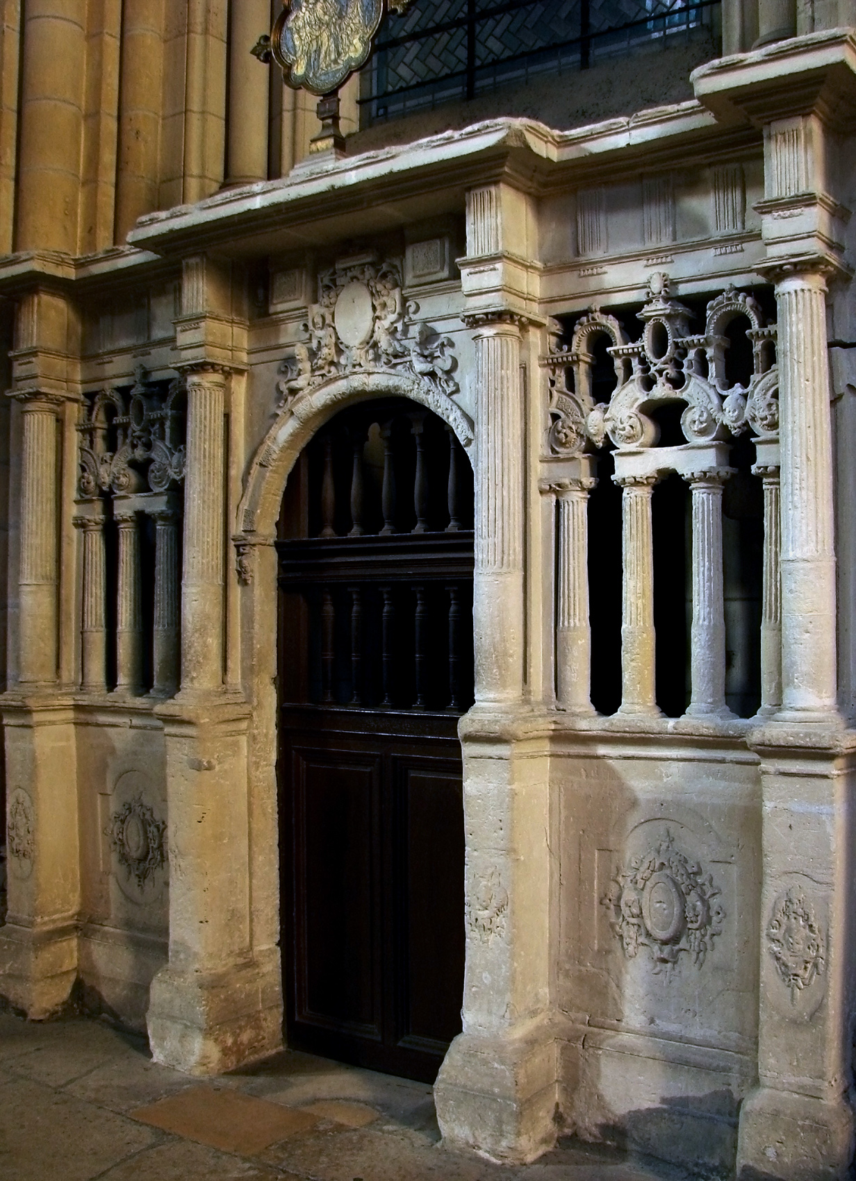 Clôture en pierre d'une chapelle de la cathédrale de Laon. Toutes les chapelles de la cathédrale ont reçu ce type de clôture entre 1555 et 1697.